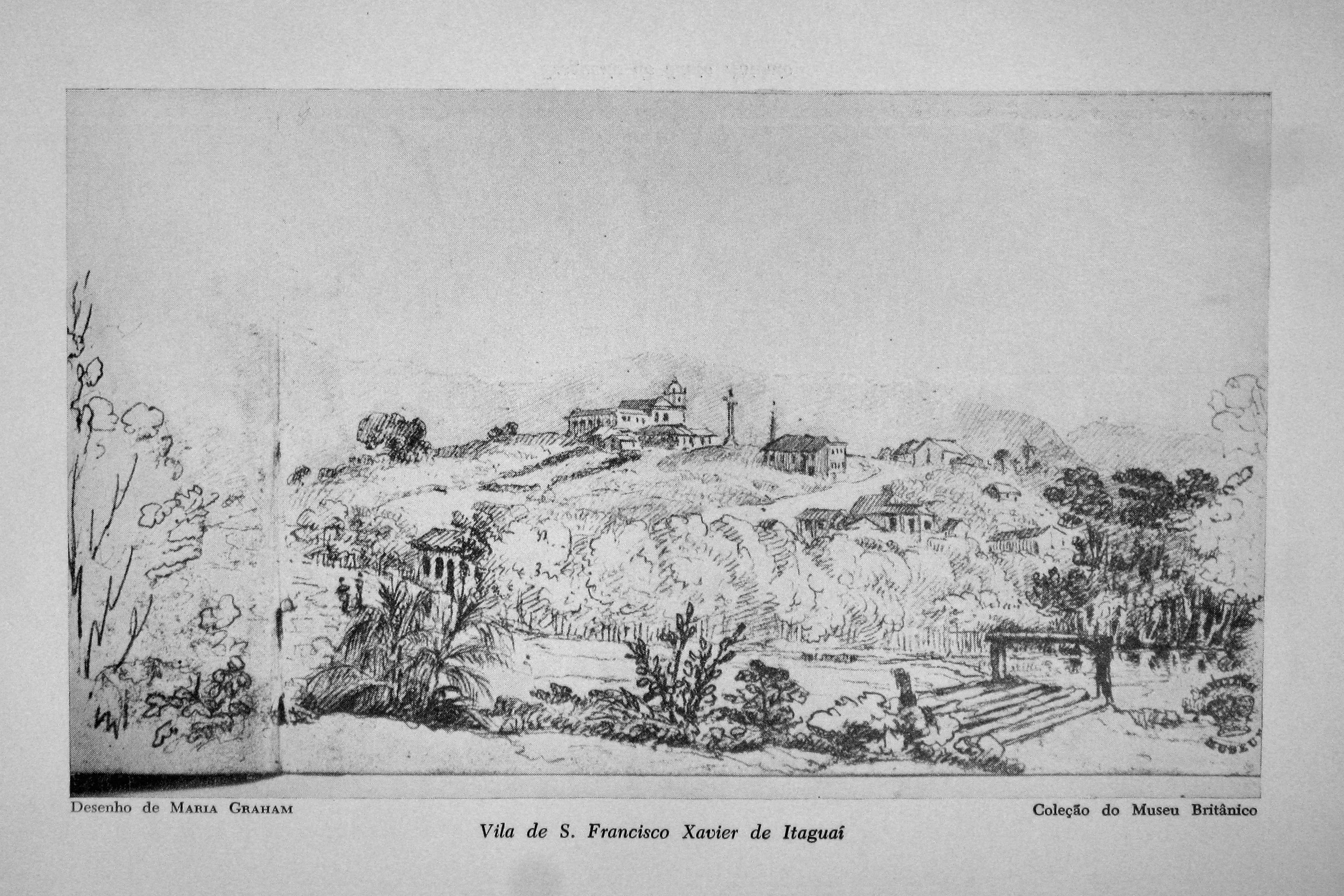 Vila de São Francisco Xavier de Itaguaí